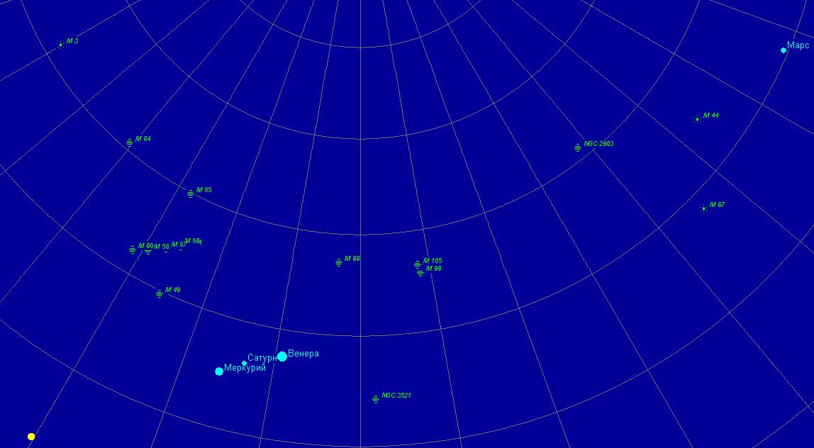 Парад планет в октябре 2009 года, вид из средних широт (55 с. ш.)